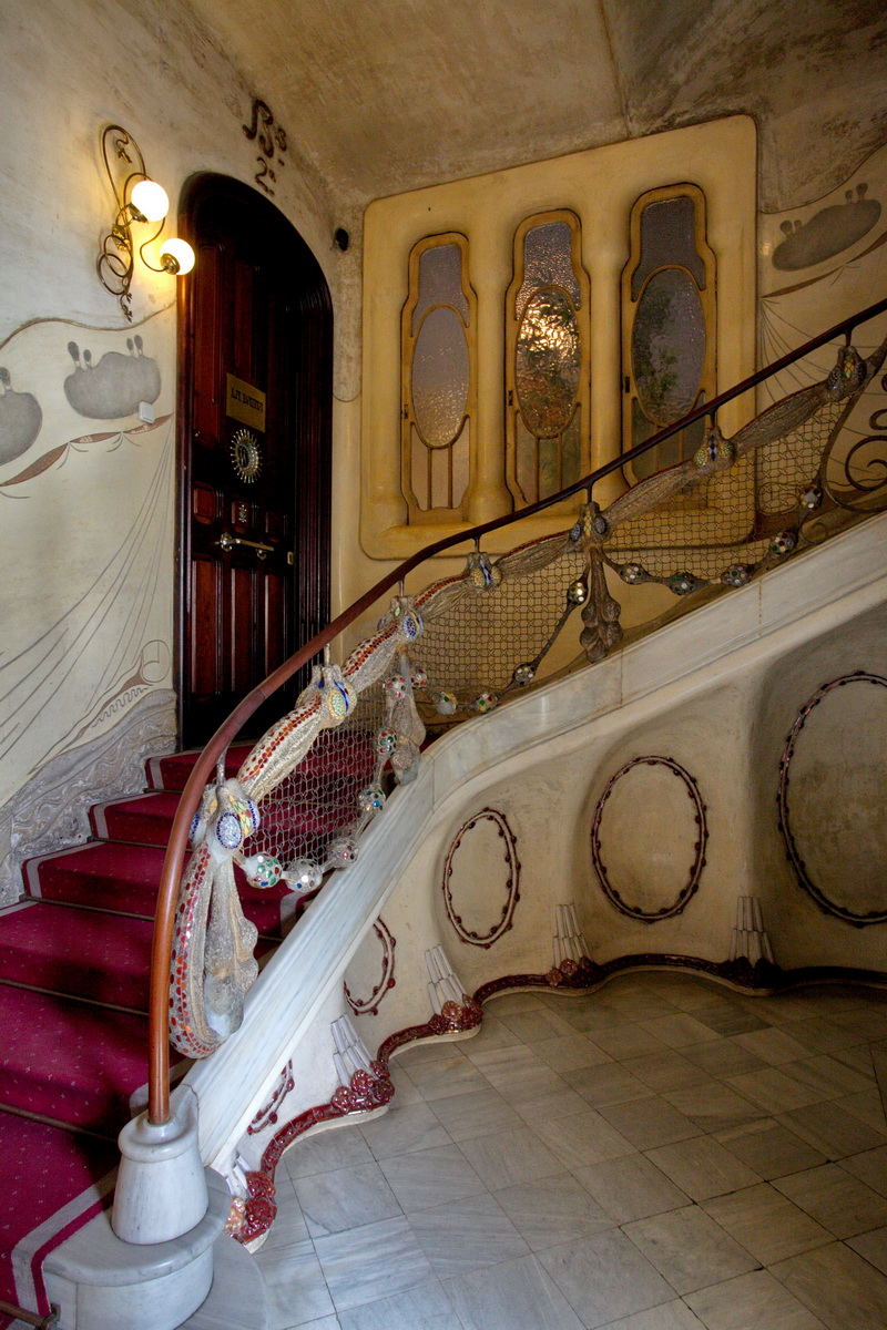 Vestíbul de la casa Sayrach. Escala simulant una xarxa de pesca i rematada amb policromia de mosaics